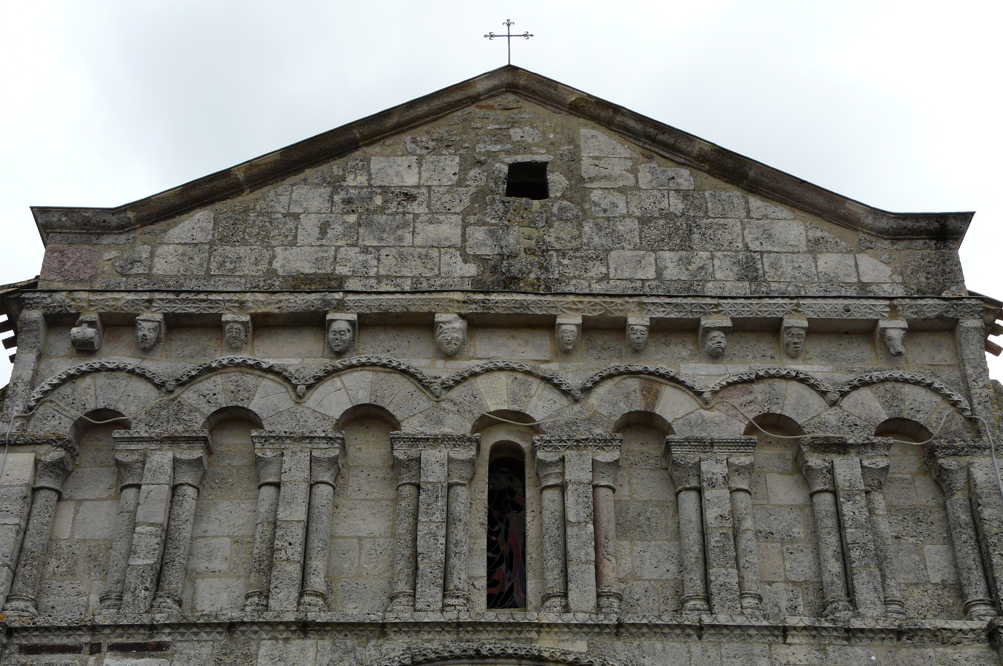 La partie supérieure de la façade occidentale, église de Saint-Martin-de-Gurson, Dordogne, France.